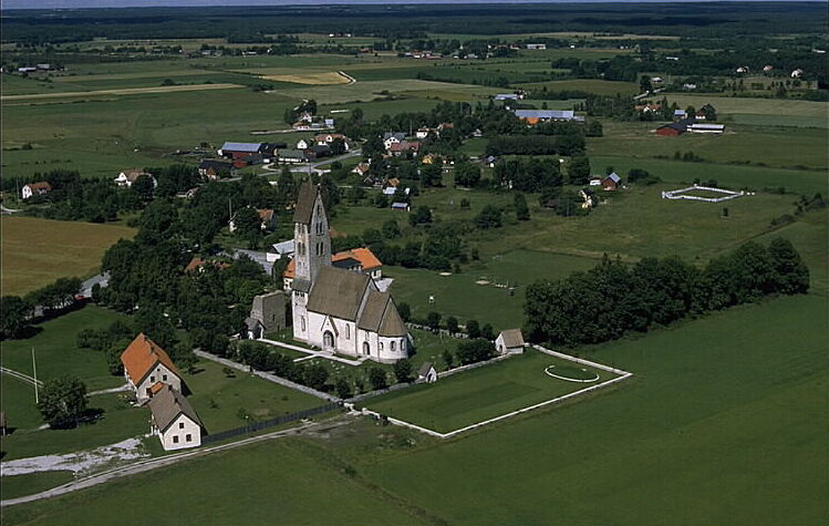 Motiv: Gothems kyrka Nyckelord: Flygbilder, Riksintressen Kategori: KyrkbyGothems kyrka